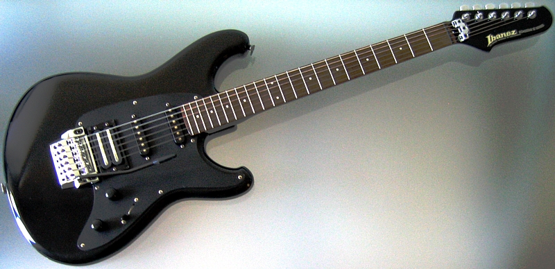 Ibanez Roadstar II Series RS 440